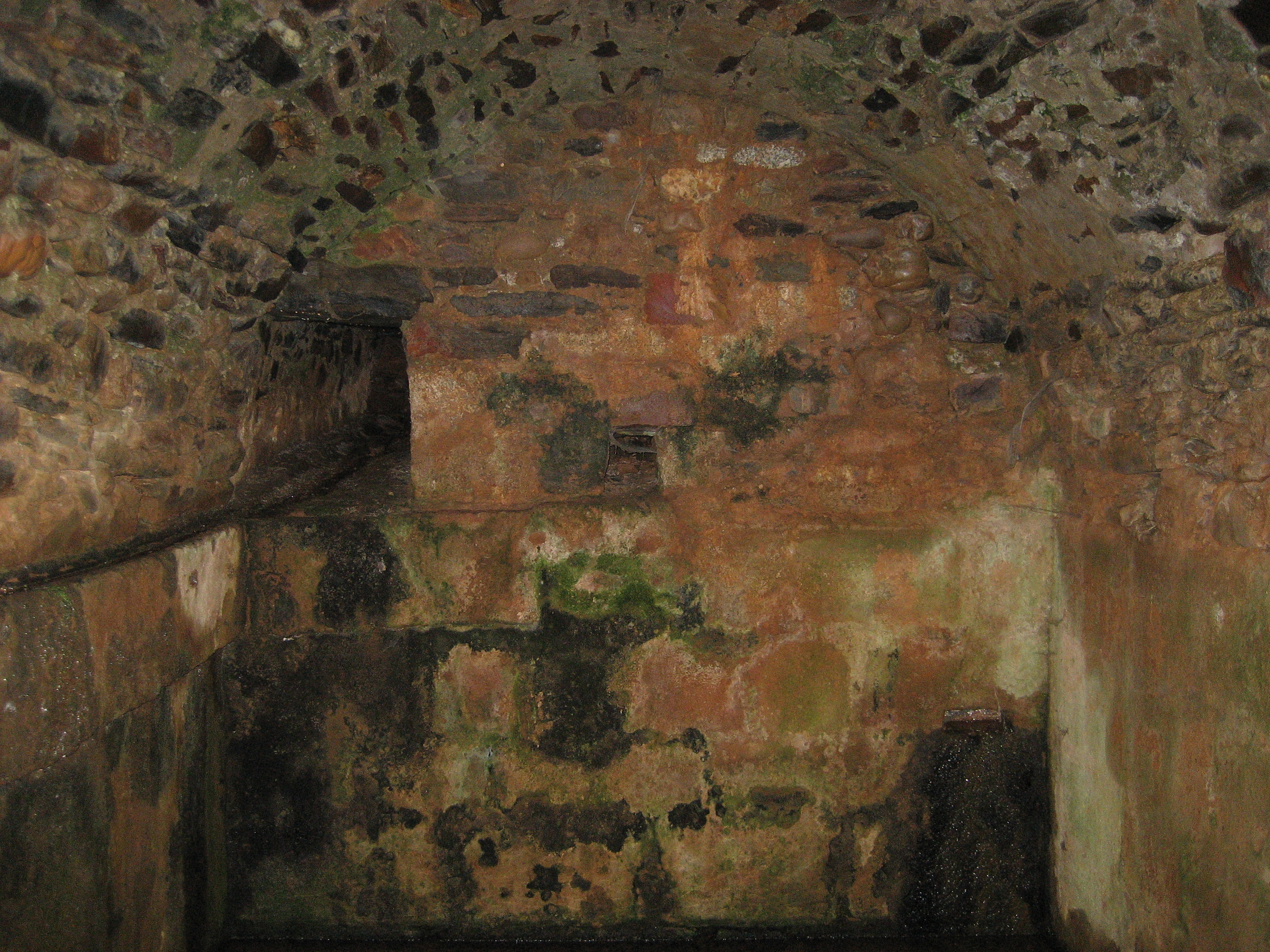 Boveda de la fuente romana de Campo de Ponferrada (Región de El Bierzo)